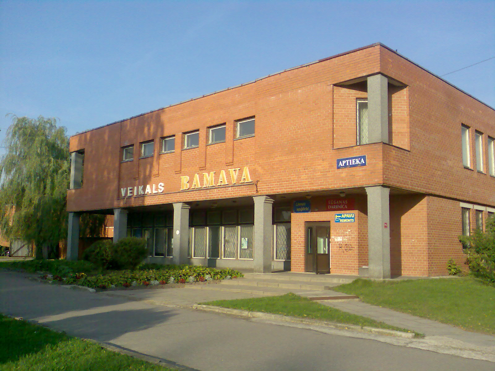 Veikals Valdlaučos